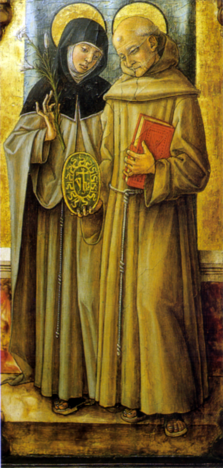 Crivelli, san piero in muralto, Santa Chiara e san Bernardino da Siena, dett